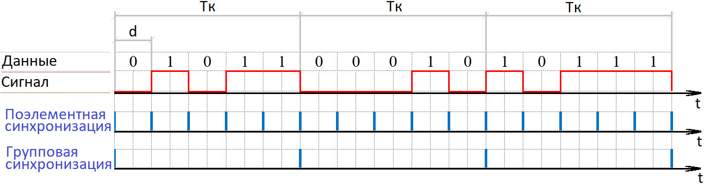 Представлены стробирующие импульсы при поэлементной и групповой синхронизации